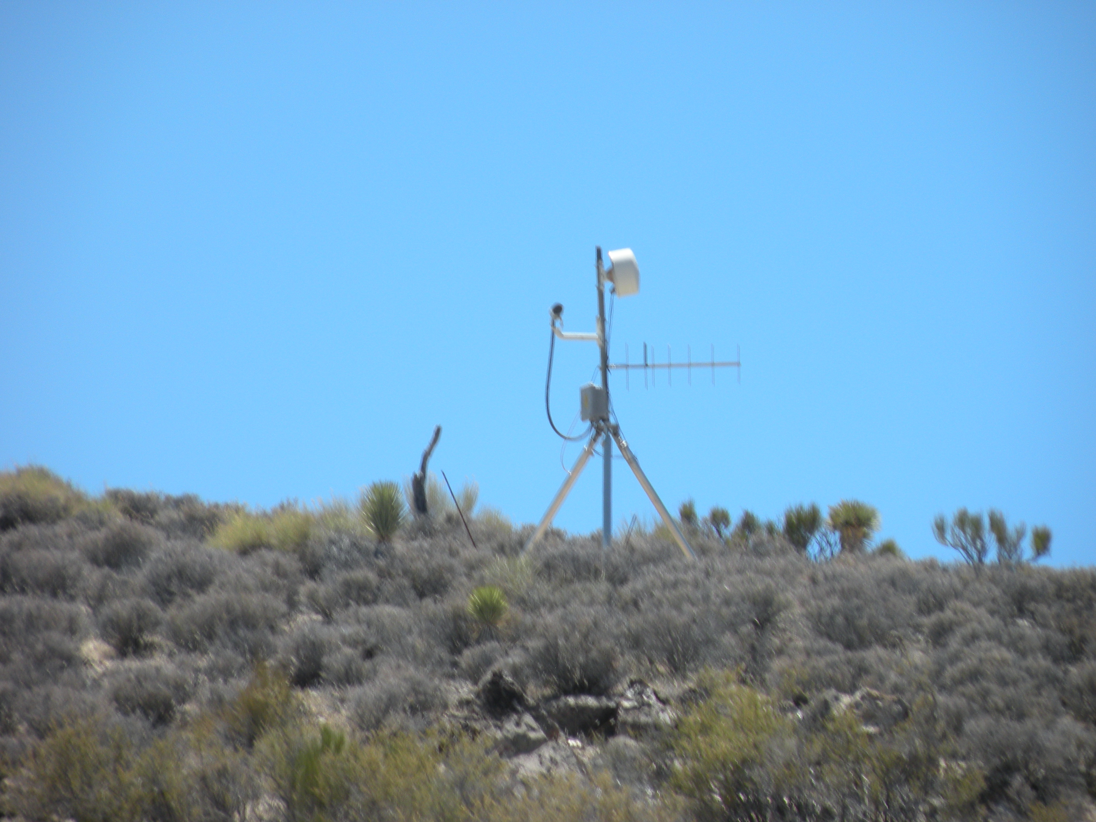 Une tour de garde équipé d'une caméra à la zone 51